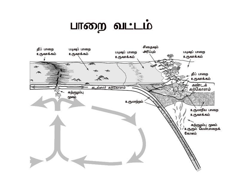 Original image taken from English Wikipedia and translated into Tamil. Information from English page has been copied in this page. Diagram describing the rock cycle, from [1]